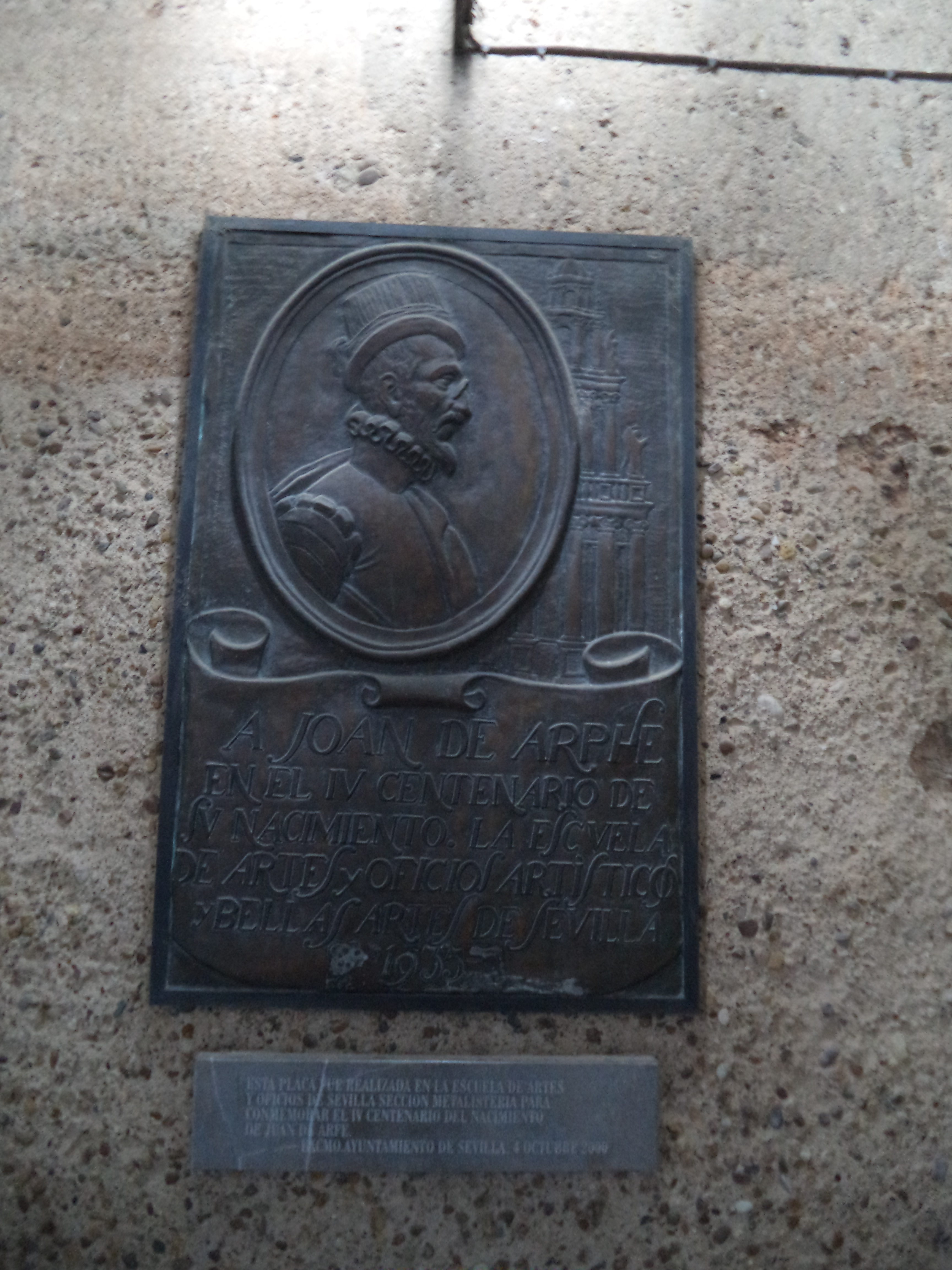 Esta placa fue realizada por alumnos de la Escuela de Artes y Oficios de Sevilla para conmemorar el IV centenario de la muerte del célebre orfebre Juan de Arfe.